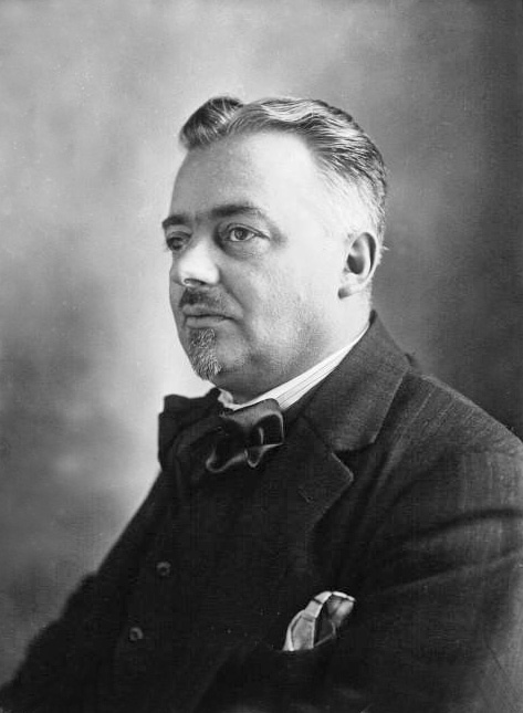 Walter, député du Bas-Rhin : photographie de presse